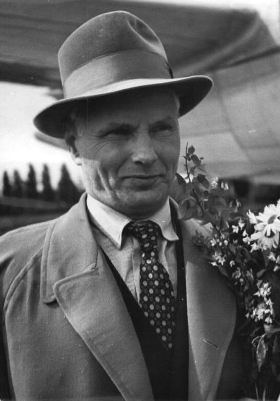 Zentralbild-Sturm 21.5.52 Sowjetische Schriftsteller in Berlin. Auf dem Flugplatz Schönefeld trafen am 21.5.1952 weitere Gäste zur Teilnahme am 3. Deutschen Schriftstellerkongreß ein. UBz: Stepan Stschipatschew